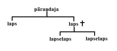 Pärandajal on kaks last, kellest üks on surnud. Surnud lapse asemele astuvad pärandaja lapselapsed (asenduspõhimõte). Elus laps pärib ½ ning kumbki lapselaps ¼ pärandvarast.